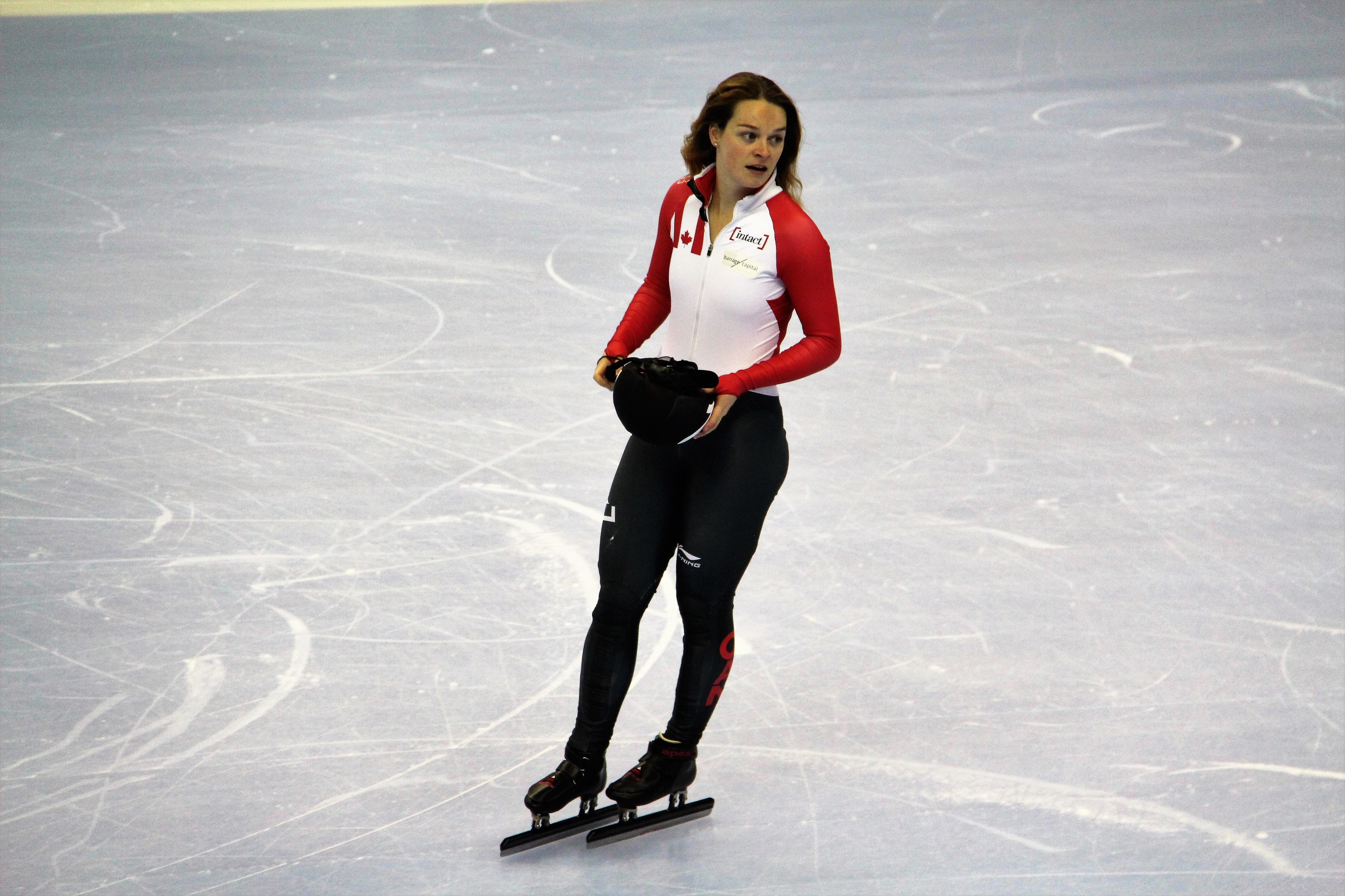 Kim Boutin aux sélections olympiques. Août 2017. Aréna Maurice Richard à Montréal.